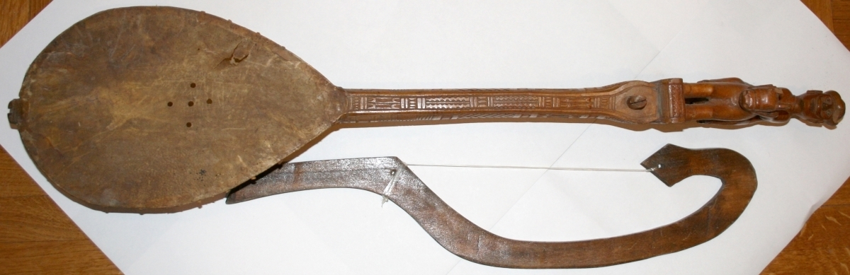 Gusle koje je izradio Marko Jukić u Zelovu kod Sinja. U Muzeju grada Šibenika nalaze se od 1947. godine.